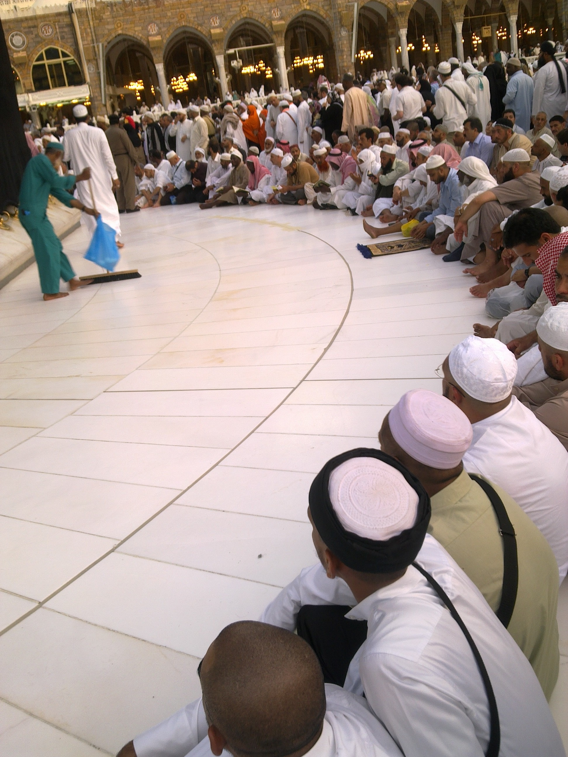 Al Haram, Mecca 24231, Saudi Arabia